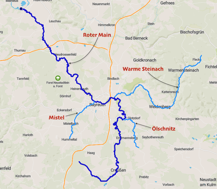 carte réalisée sur umap This map may be incomplete, and may contain errors. Don't rely solely on it for navigation.